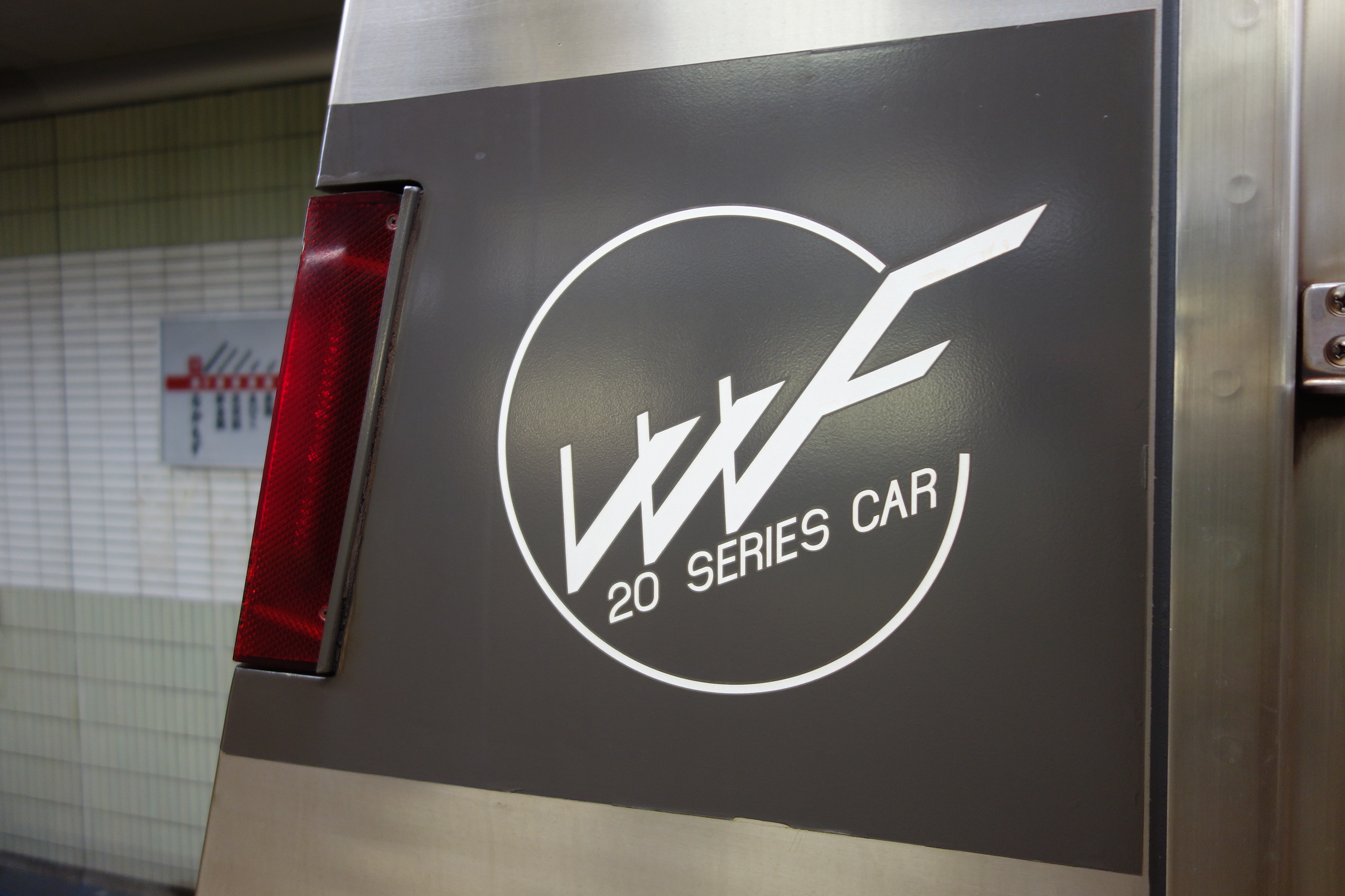 大阪市交新20系 VVVFロゴ